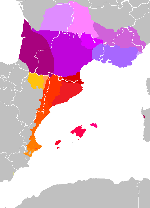 Lenguas ibero orientales Vivaroalpino Auvernense Limosín Provenzal Languedociano Gascón Balear Alguerés Rosellonés Catalán central Catalán noroccidental Valenciano dialecto de transición (Ribagorzano) Aragonés